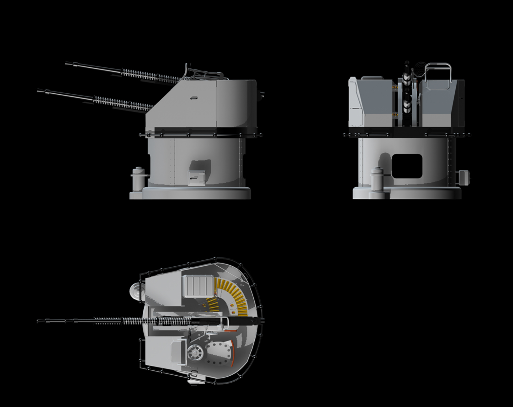 Dreiseitenansicht des Flugabwehrgeschützes Typ 2M-3